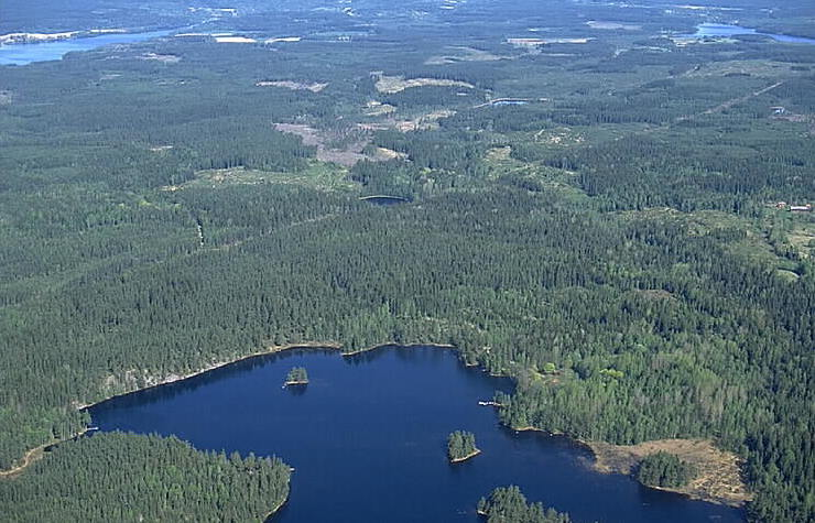 Motiv: Vena gruvfält Nyckelord: Flygbilder, Riksintressen Kategori: GruvområdeVena gruvfält